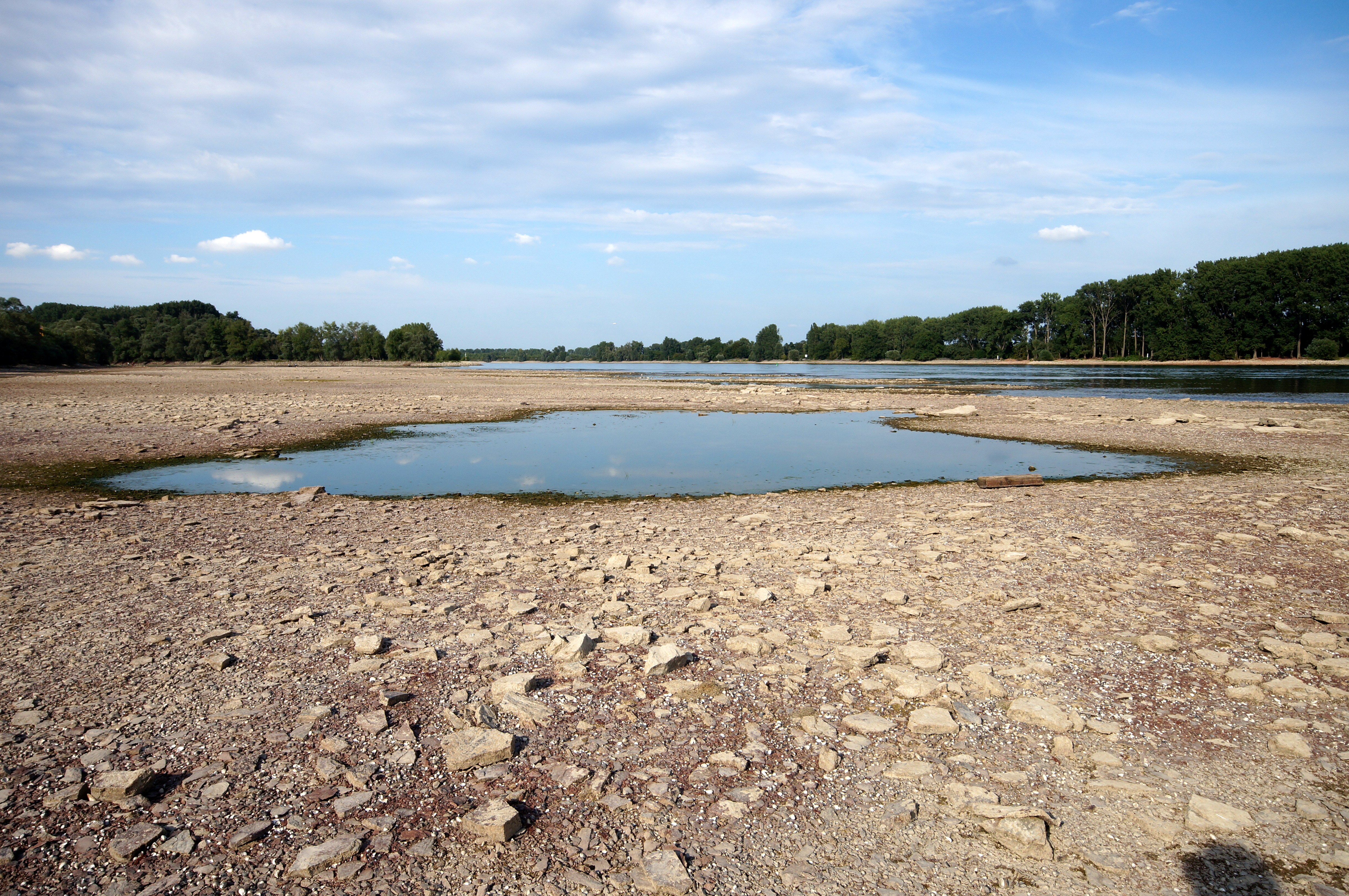 Folgen der Austrocknung des Oberrheins zwischen Nackenheim und Nierstein bei Mainz in Rheinhessen infolge der Hitzewelle in Europa im Sommer 2015